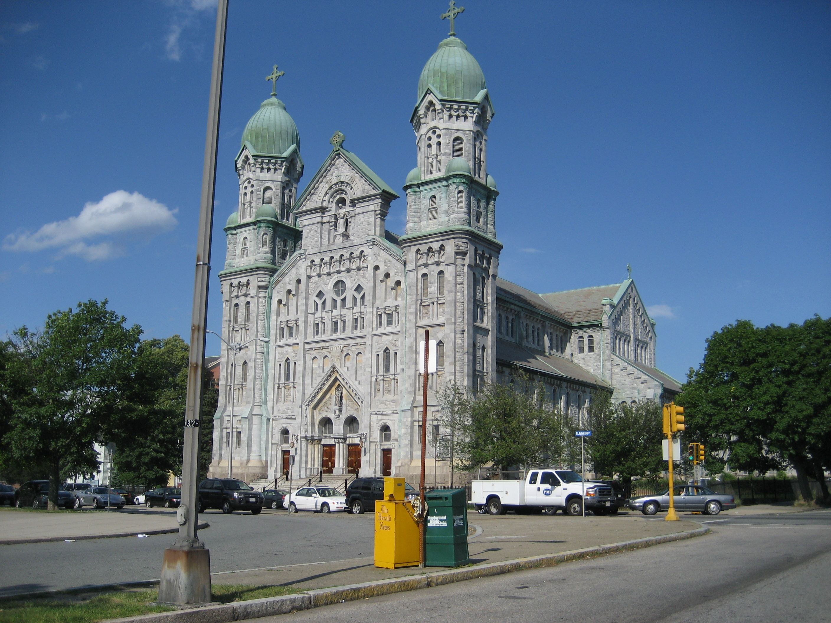 Fall River, Massachusetts: St. Anne's Church